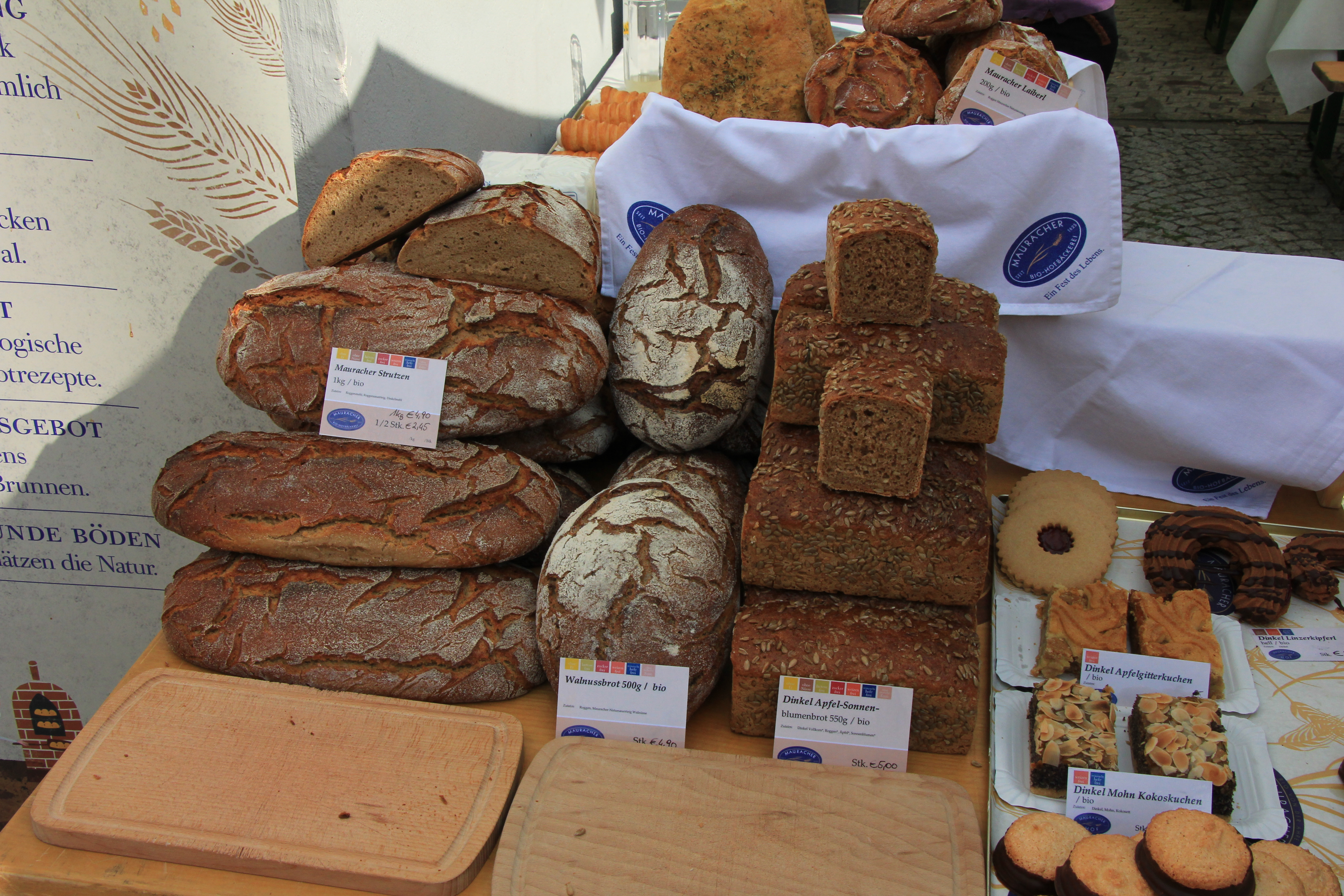 Eindrücke bei der Ortsbildmesse in Kirchberg ob der Donau im oberösterreichischen Mühlviertel